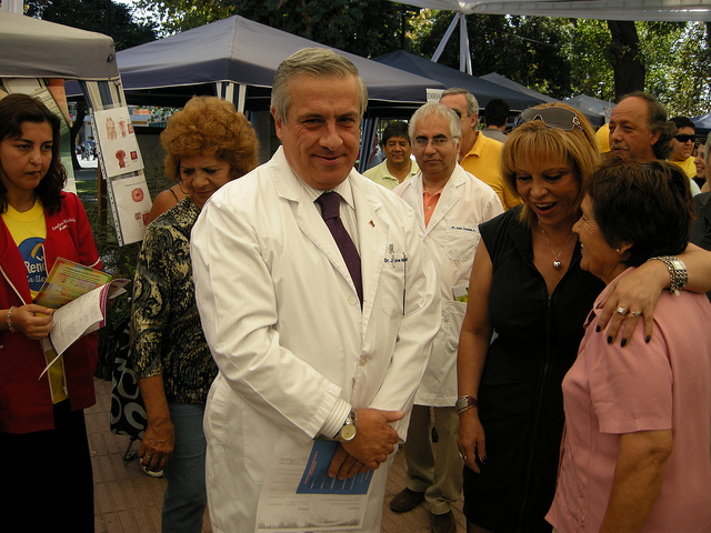 Ministro de Salud de Chile Jaime Mañalich, en Plaza saludable de Renca.